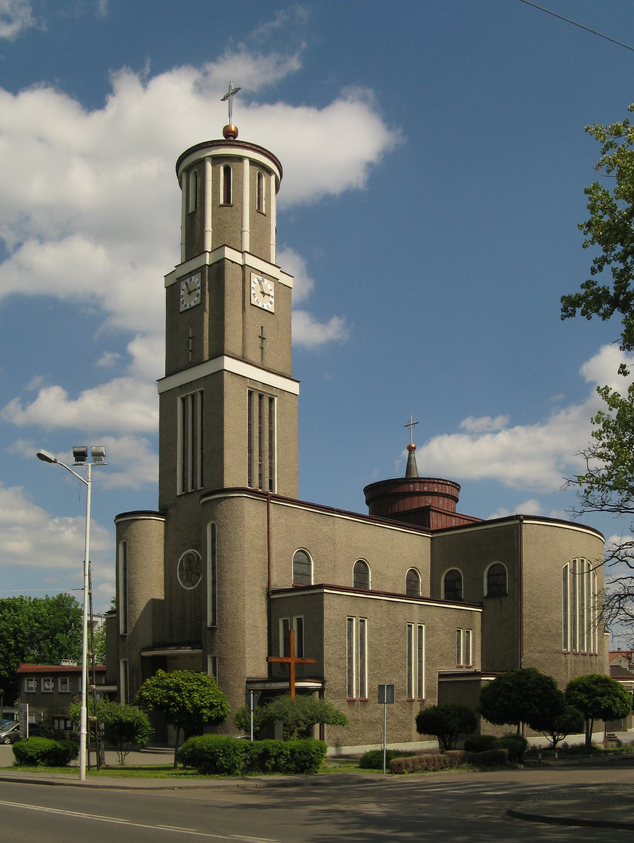 kościół św. Józefa w Świętochłowicach, widok z okolicy torowiska tramwajowego